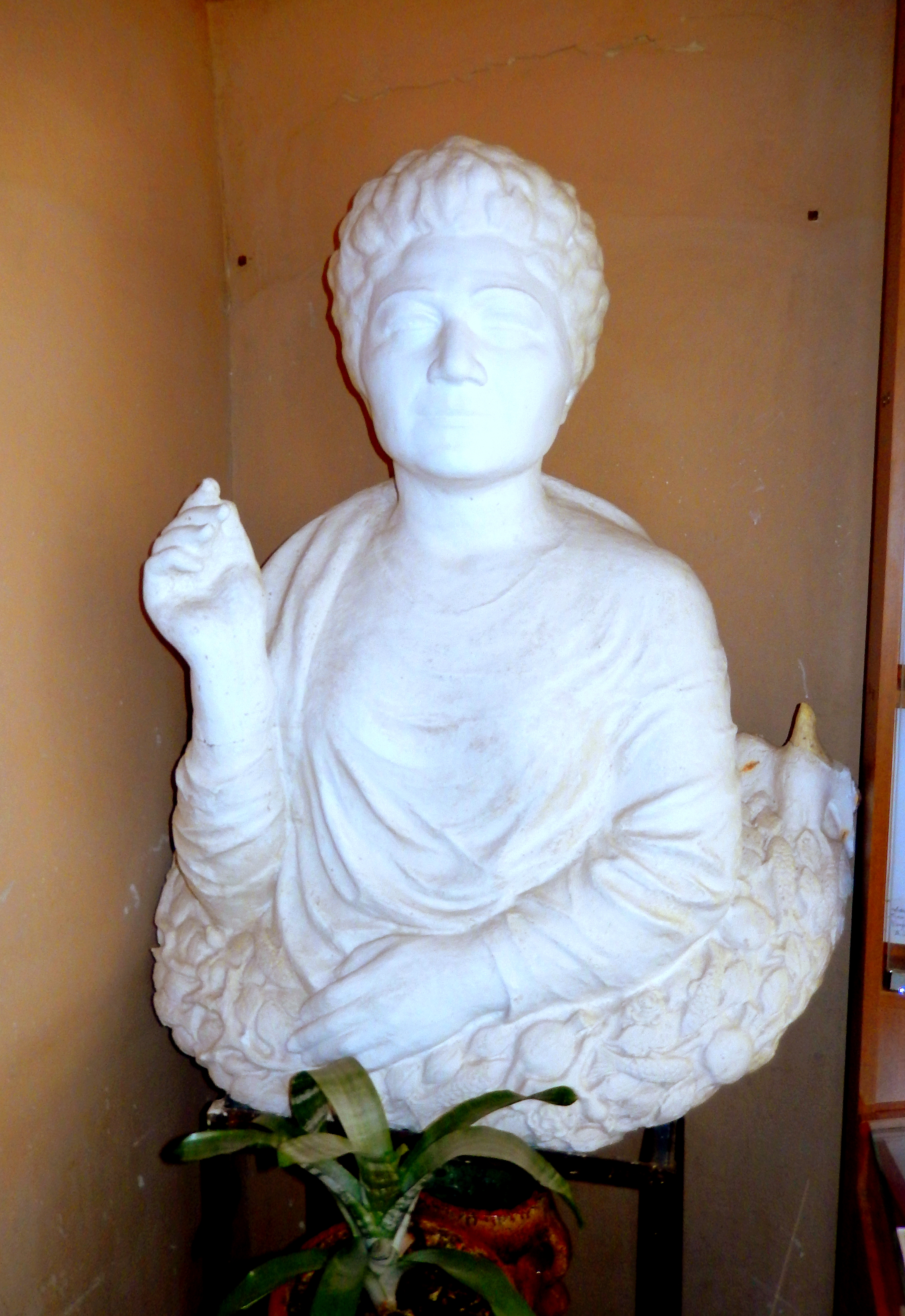 Սիլվա Կապուտիկյանի տուն թանգարան